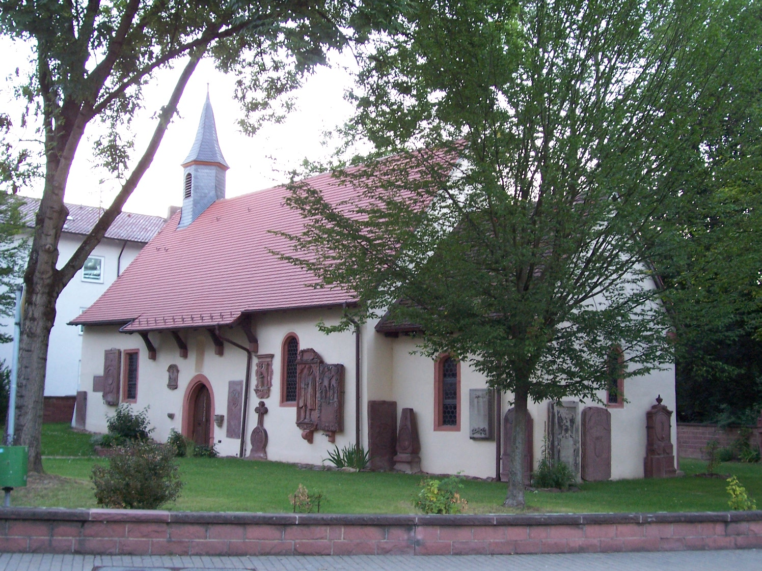 Peterskapelle Tauberbischofsheim, erbaut 1180